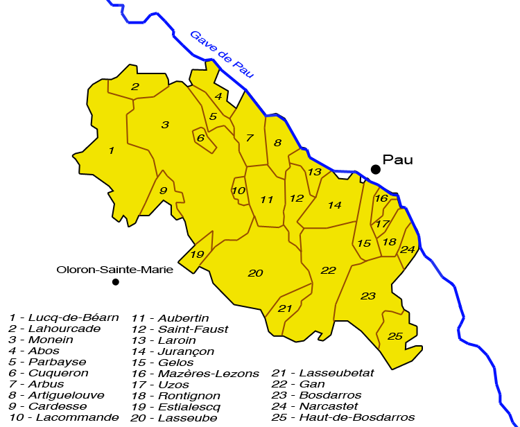 Carte de l'AOC Jurançon